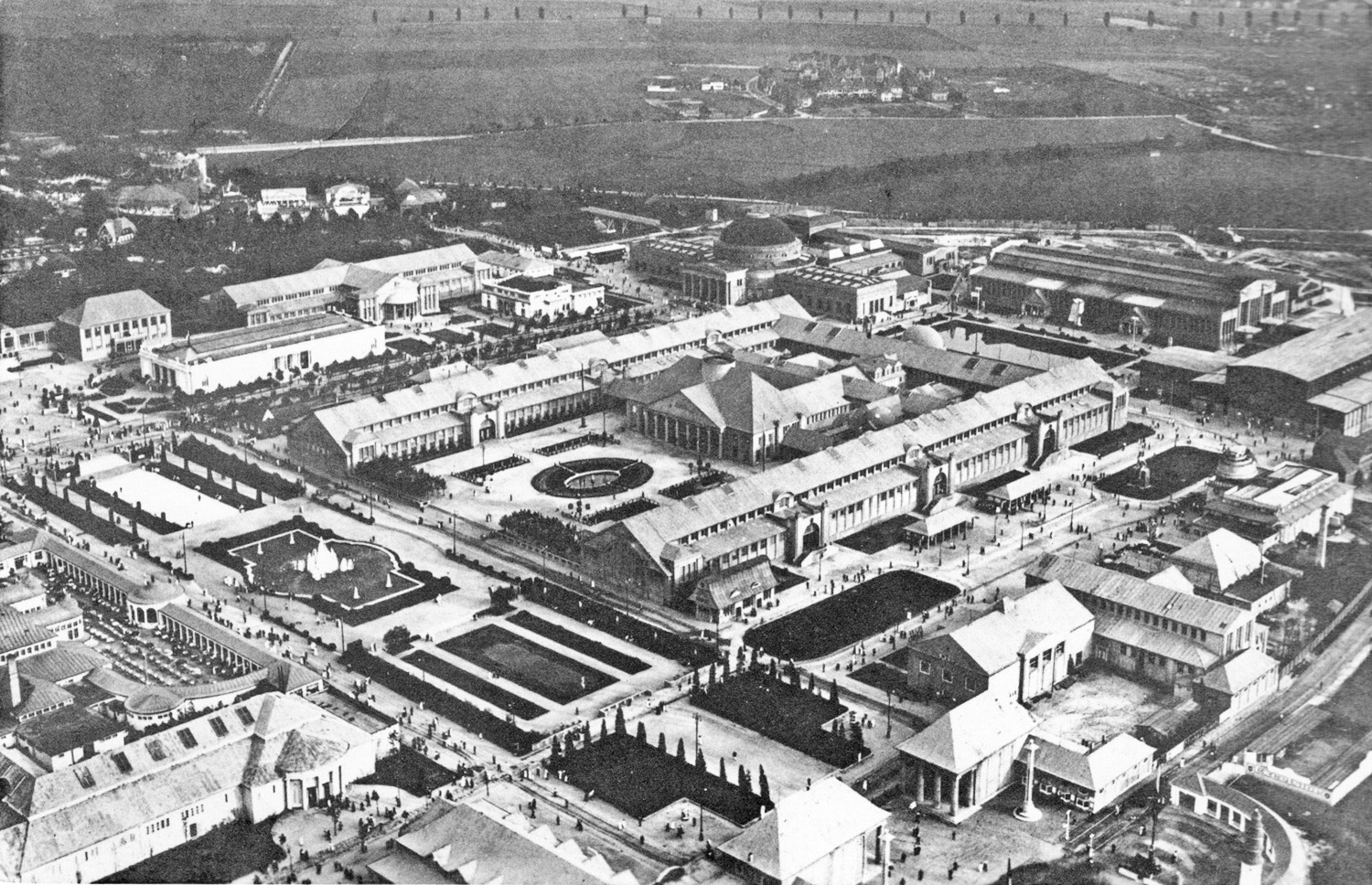 Das Gelände der Bugra 1914 in Leipzig